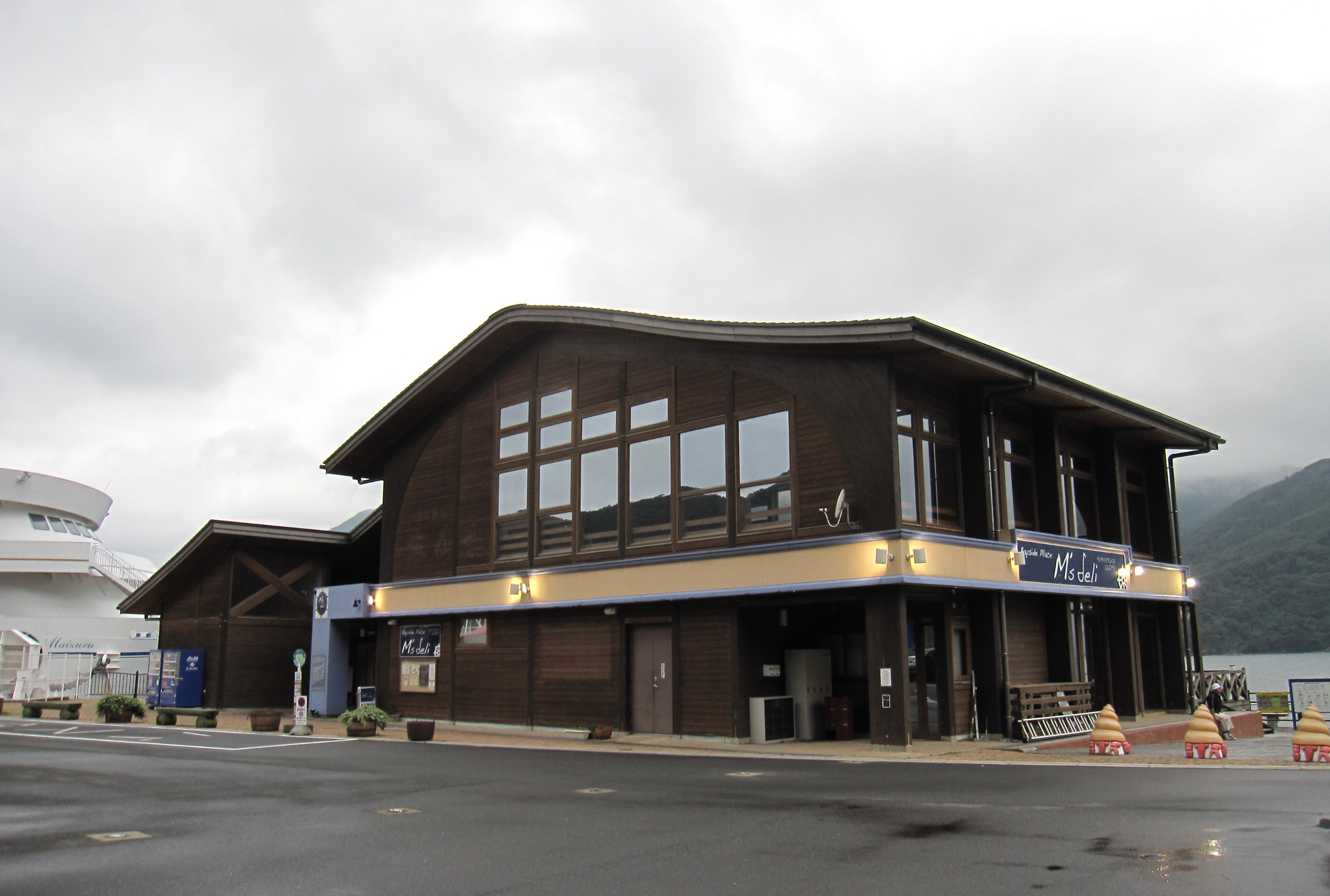 ベイサイドプレイスエムズデリ